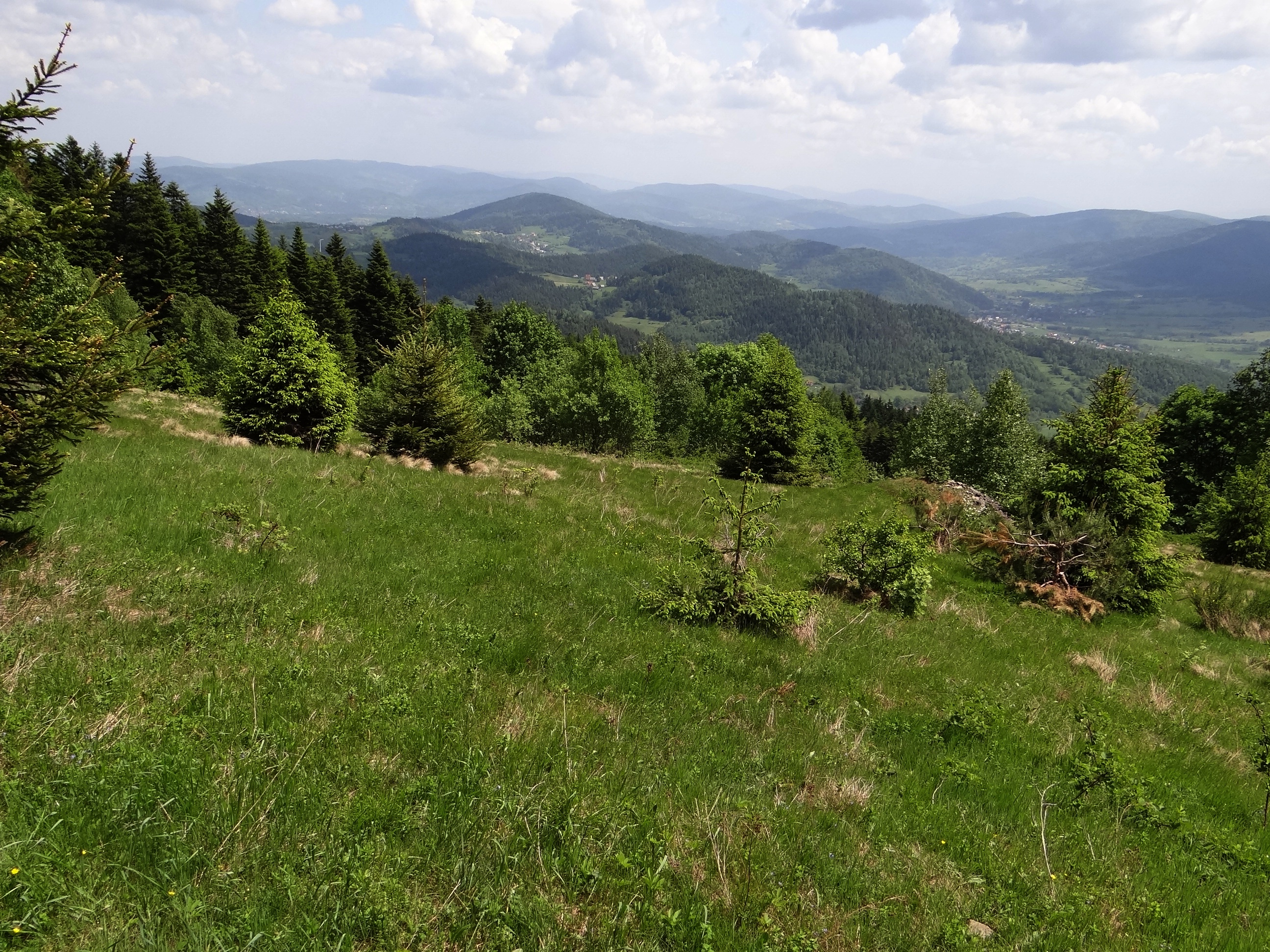 Kiczora (Pasmo Jałowieckie) i widok na Beskid Makowski i Pasmo Babiogórskie